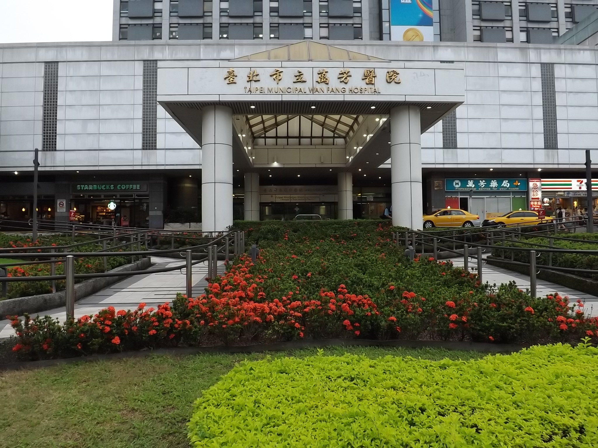 萬芳社區 -臺北市立萬芳醫院(DSCF9352)